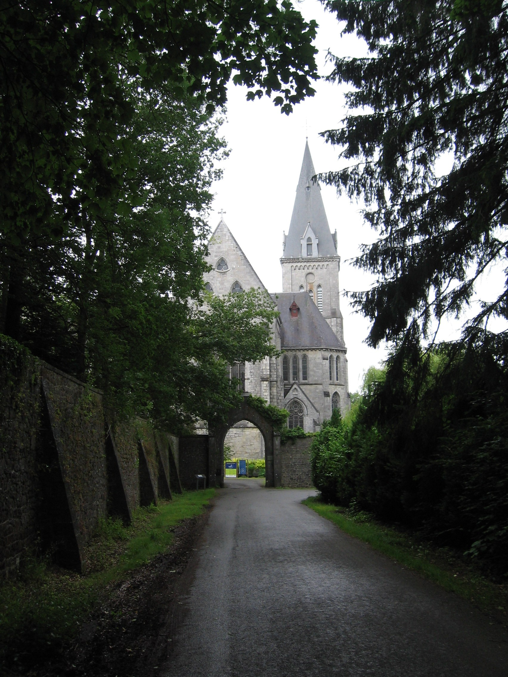 Portail de l'abbaye de Maredret